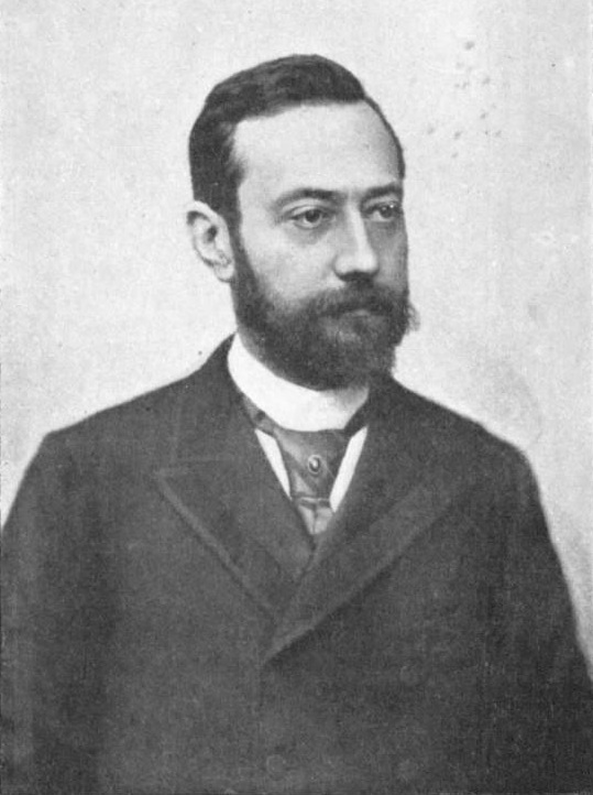 "Maurice Talmeyr, rédacteur au Gaulois (Phot. Benque)".